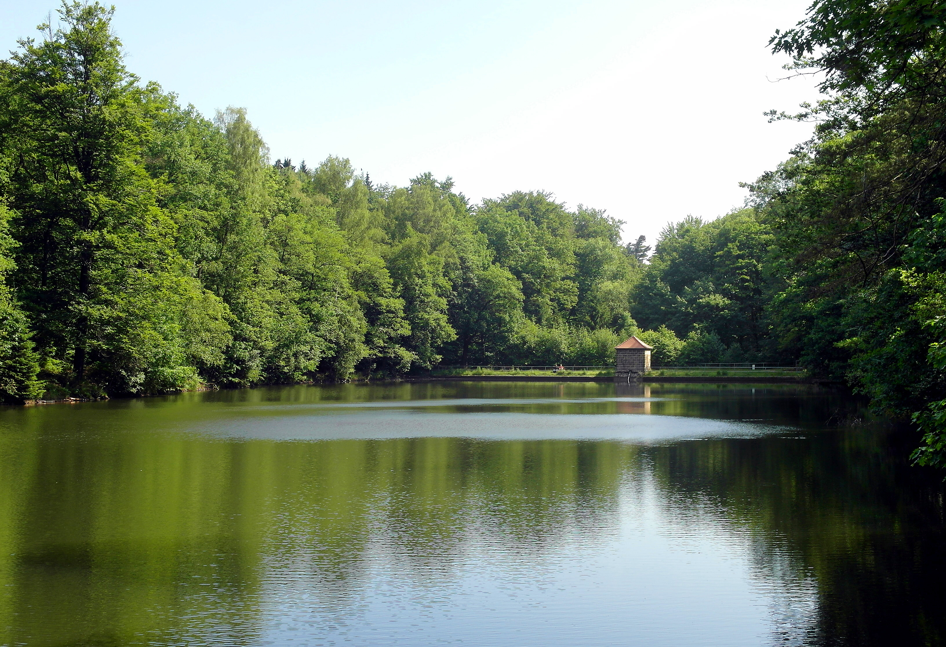 18.06.2014 01737 Tharandt : Seerenteich im Tharandter Wald. Stausee, 1828 zum Holzflößen angelegt (GMP: 50.944246,13.537754). [SAM4690.JPG]20140618120DR.JPG(c)Blobelt